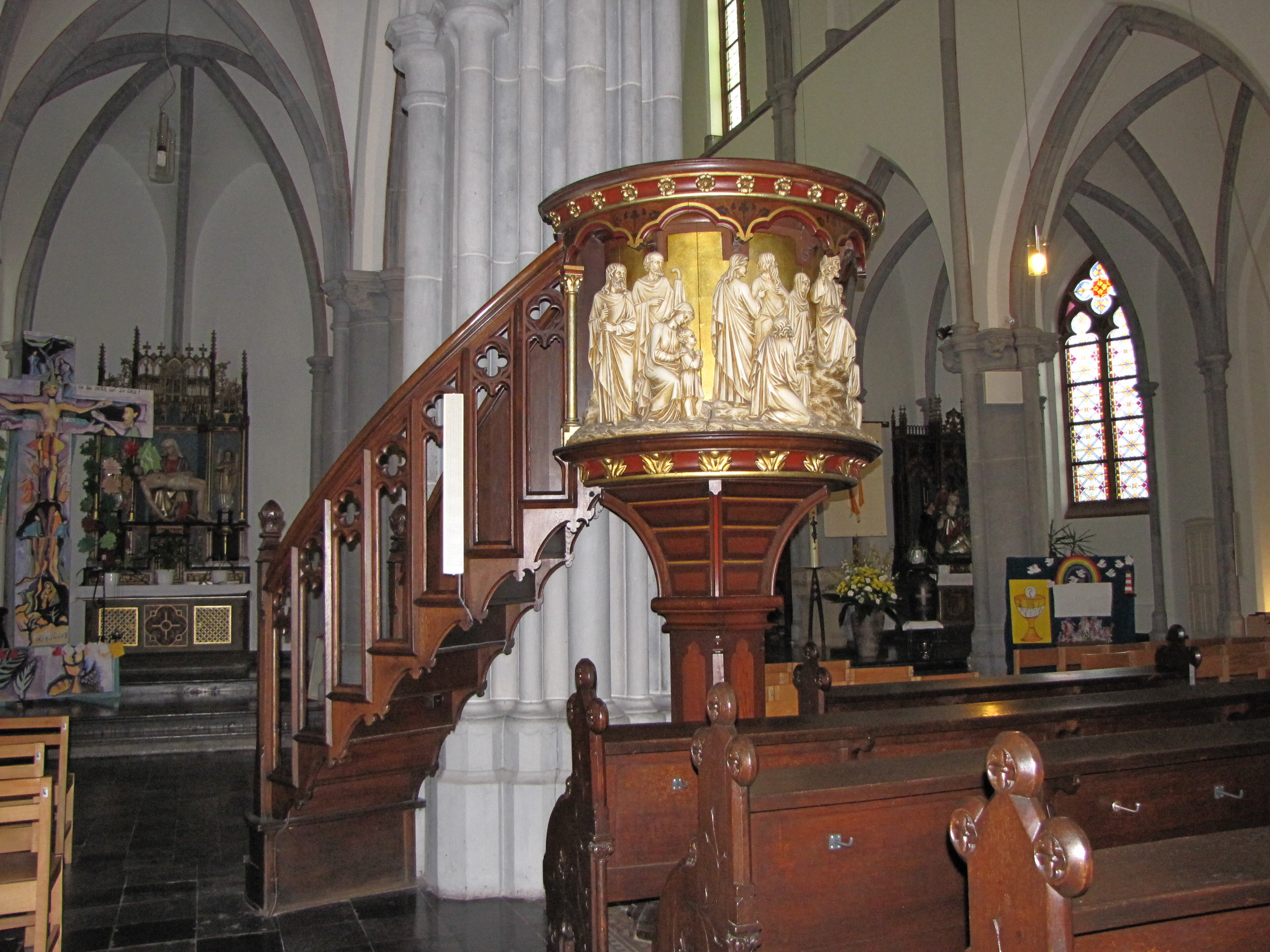 Eglise St Joseph, néogothique, Eupen